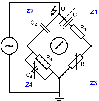 Meetbrug van Schering